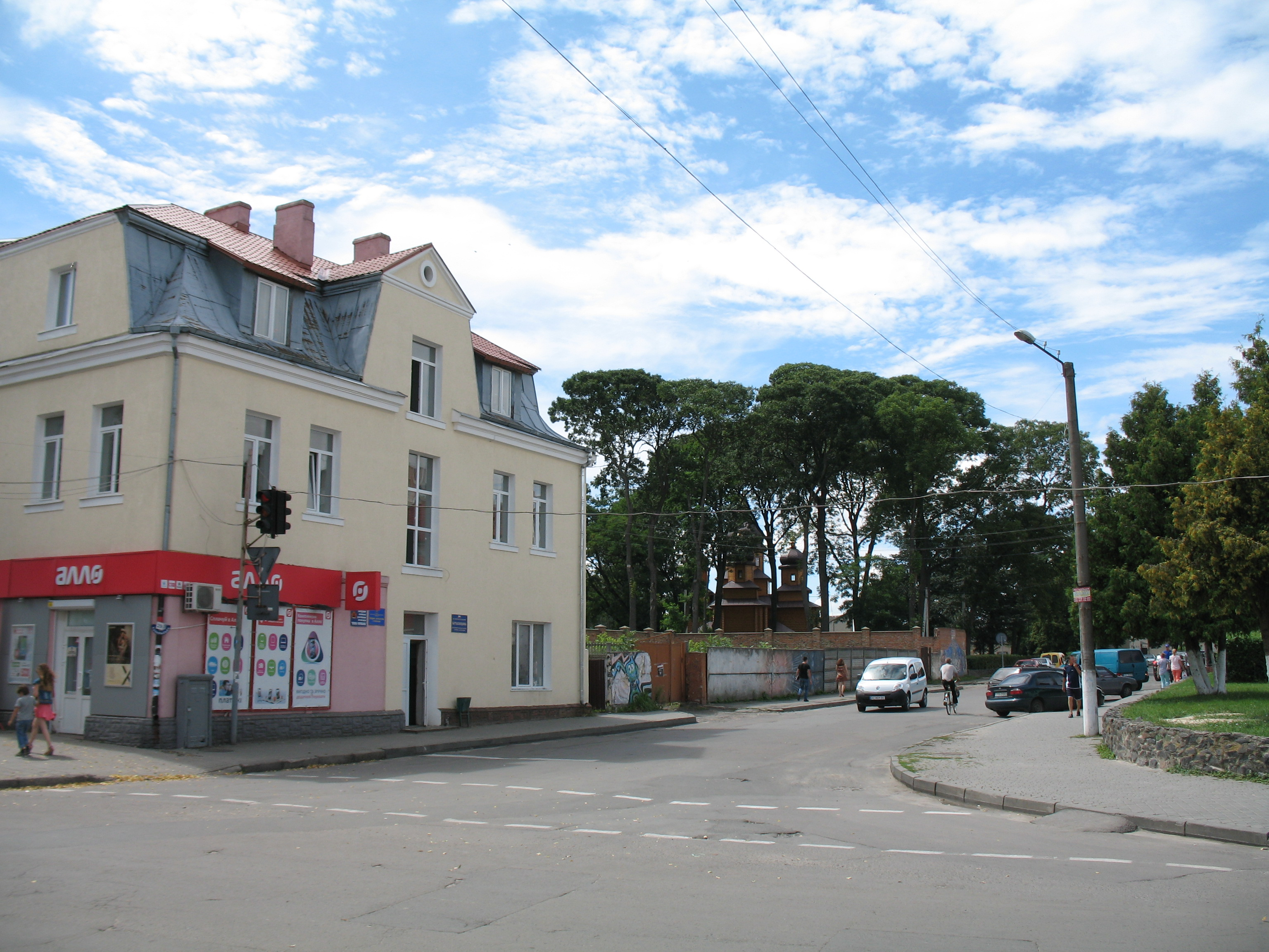 Володимир-Волинський. Будинок на перехресті вулиць Драгоманова та Ковельська